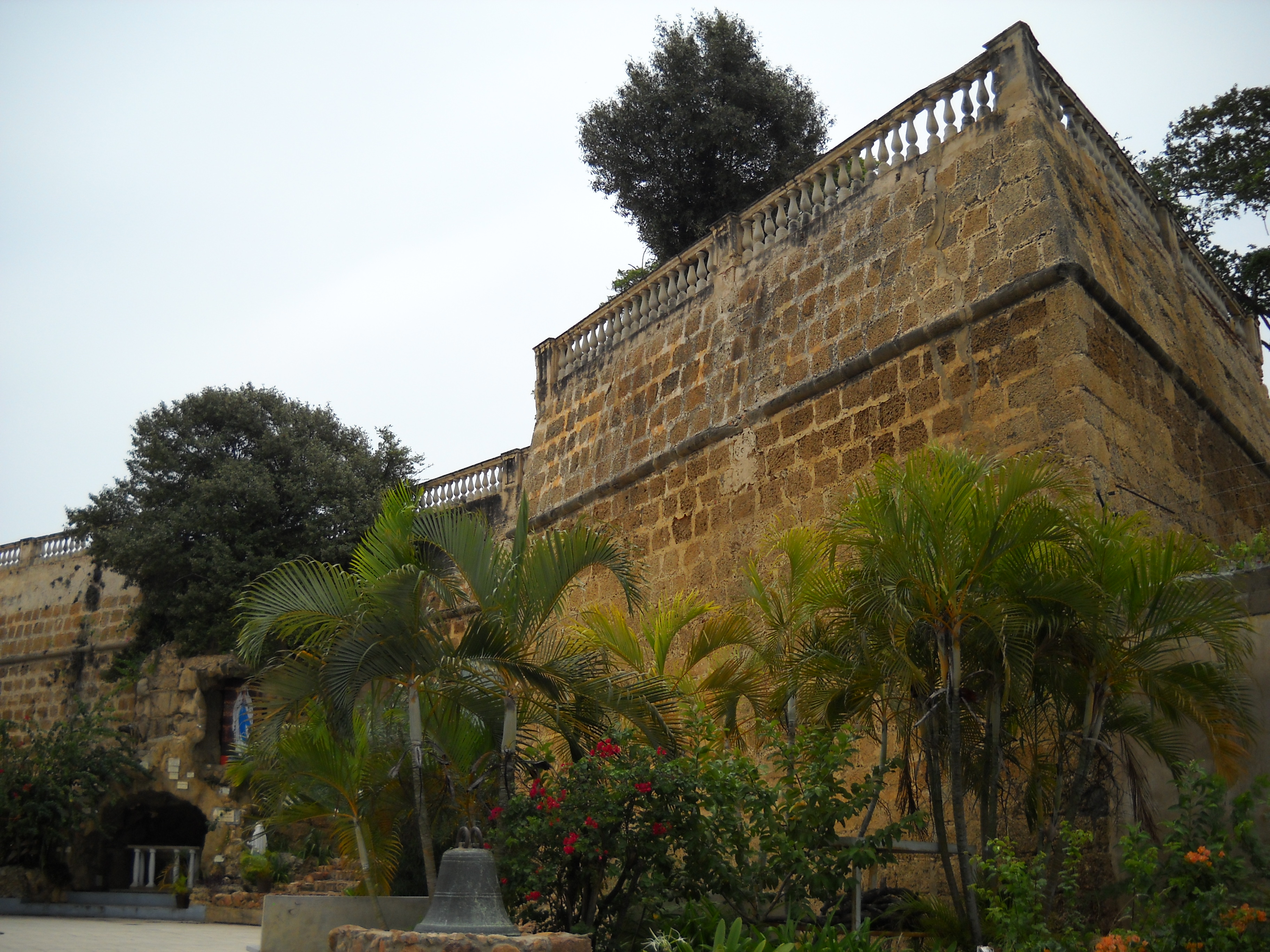 Primera fortificación estable construida en la ciudad de Cumaná, urbe considerada la primera fundada por los españoles en tierra firme americana.